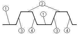 Señal digital (Digital signal)